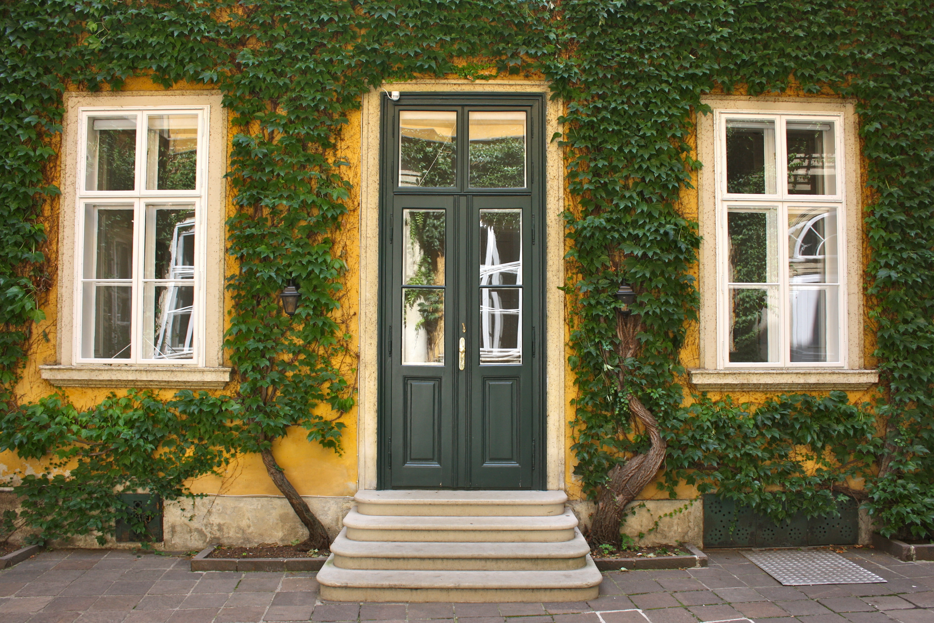 Pfarrhaus der Reformierten Stadtkirche in Wien, hofseitiger Eingang zum Gemeindesaal.